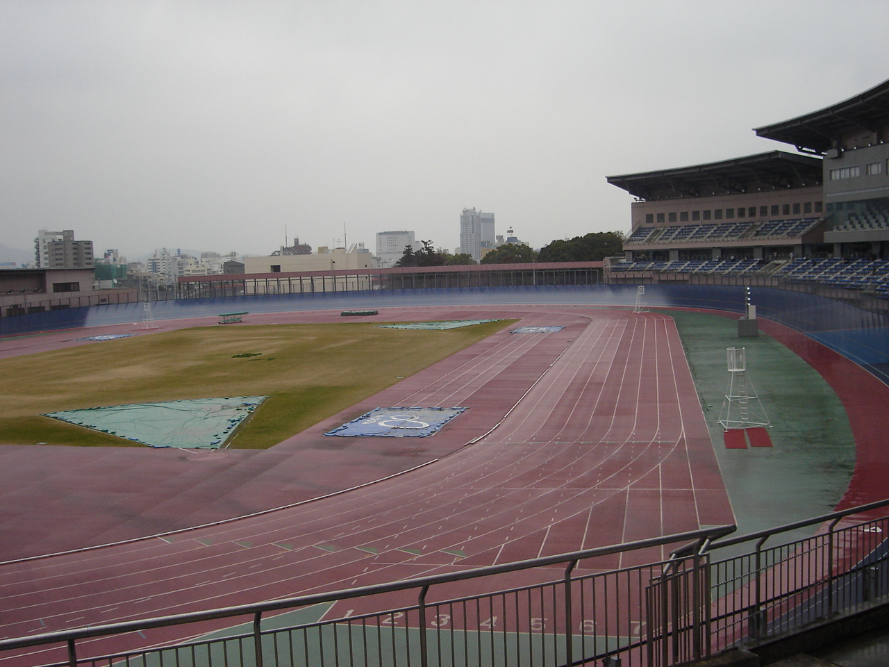 高知競輪場。 - 日本国高知県高知市にある競技場。